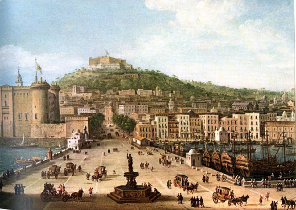 Antonio Joli - Veduta di Napoli dal molo del porto, con fontana della Nautica in primo piano (oggi non più esistente; si conserva solo la statua centrale, riutilizzata per la Fontana della Fortuna in Palazzo Reale).